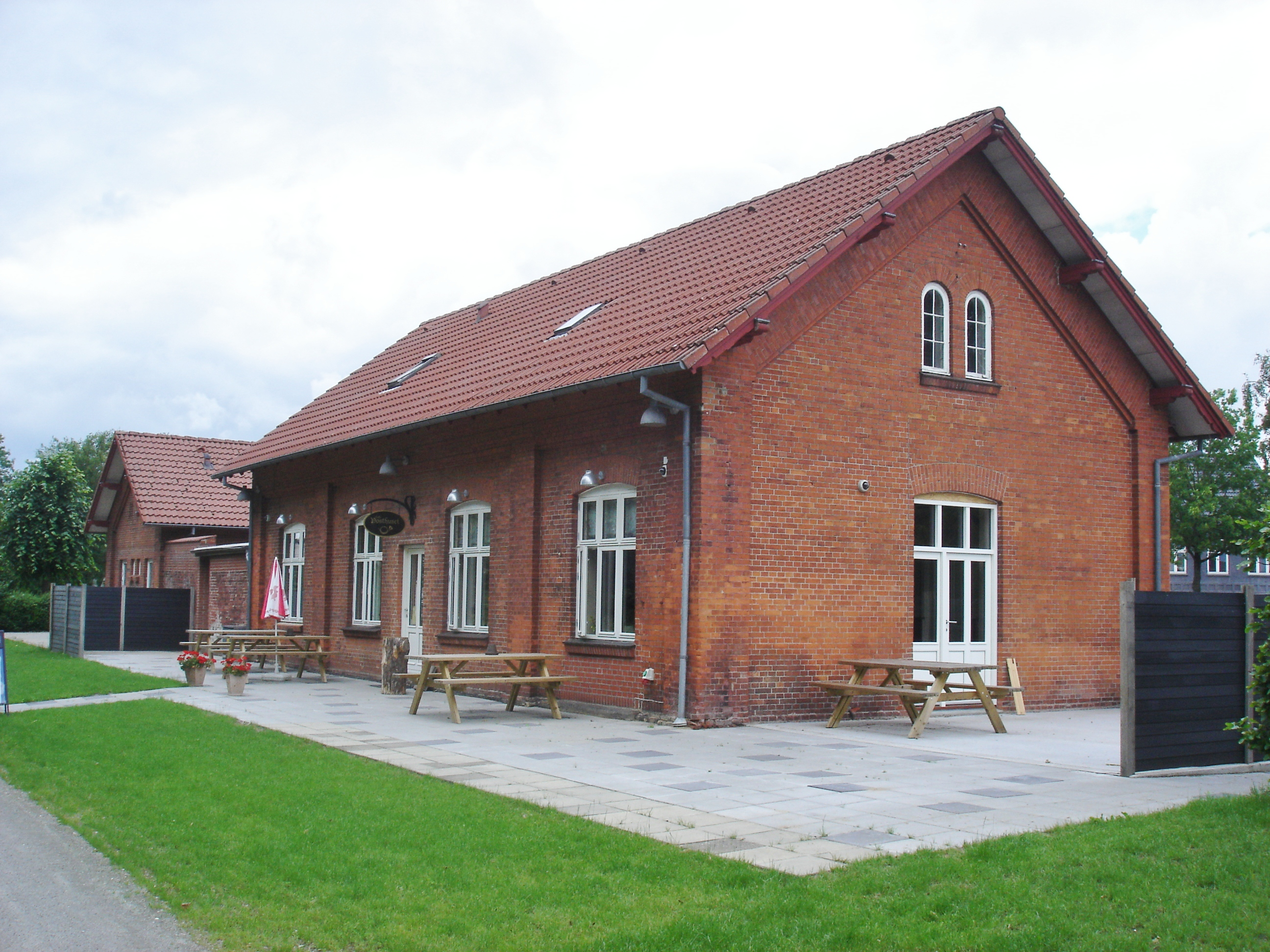 Skals Station fra sporsiden